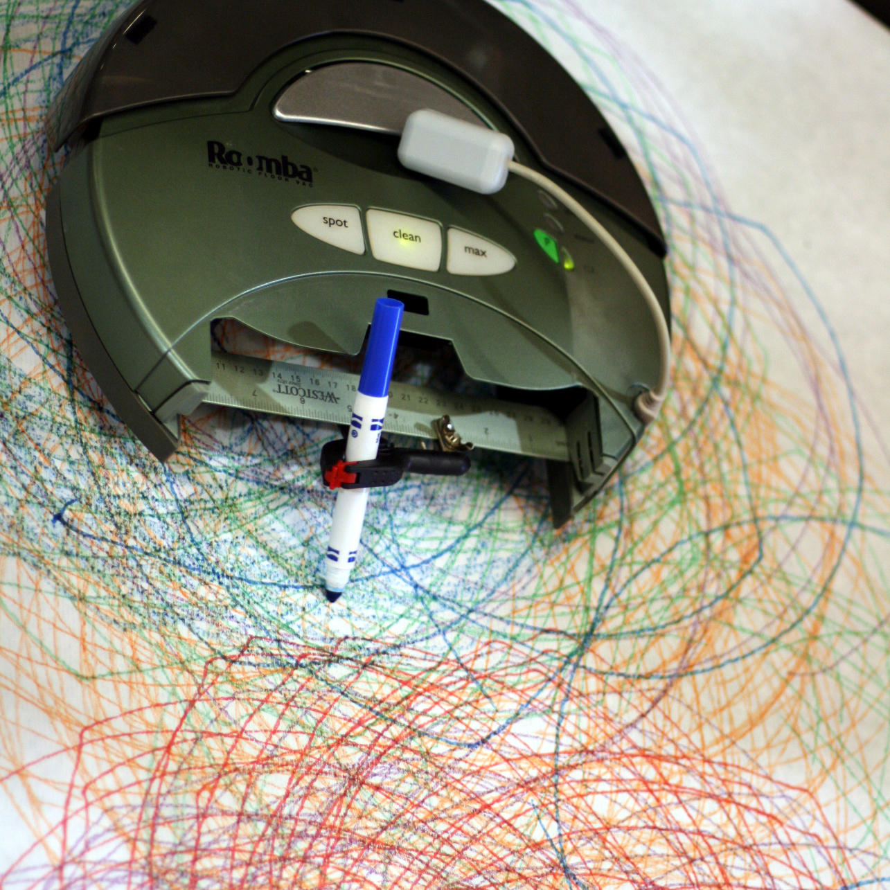 Roomba Art